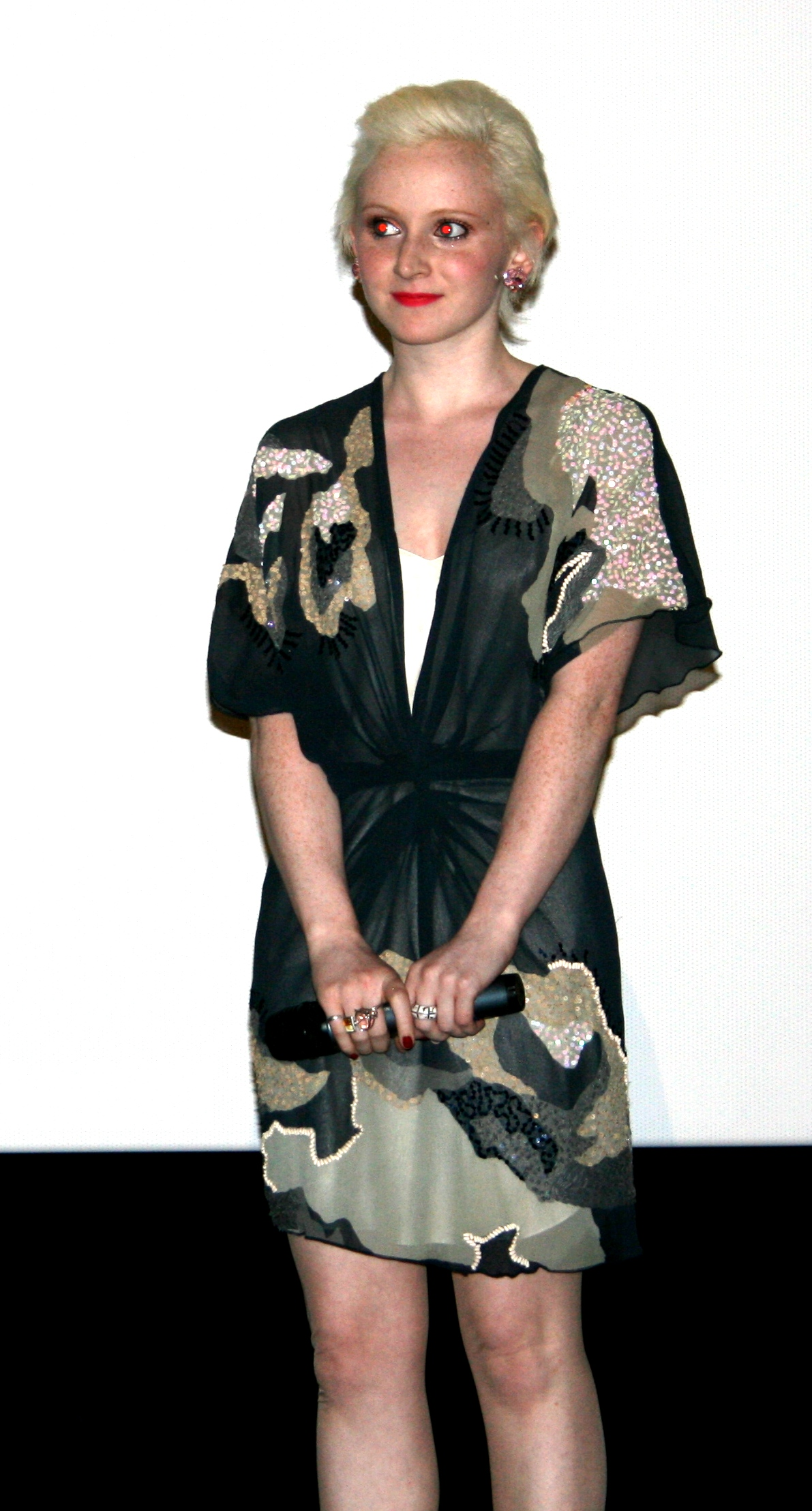 Jenn Murray à l'avant-première de Dorothy diffusée à l'UGC Ciné Cité Bercy, à Paris.